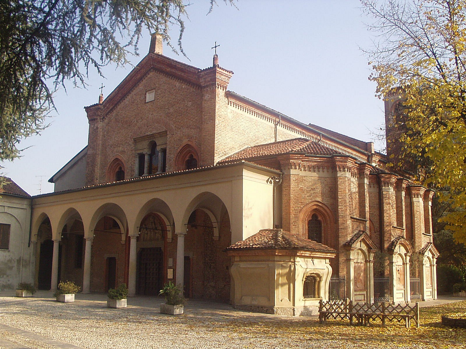 Chiesa di Santa Maria delle Grazie di Monza detta anche "Grazie vecchie" facciata con portico